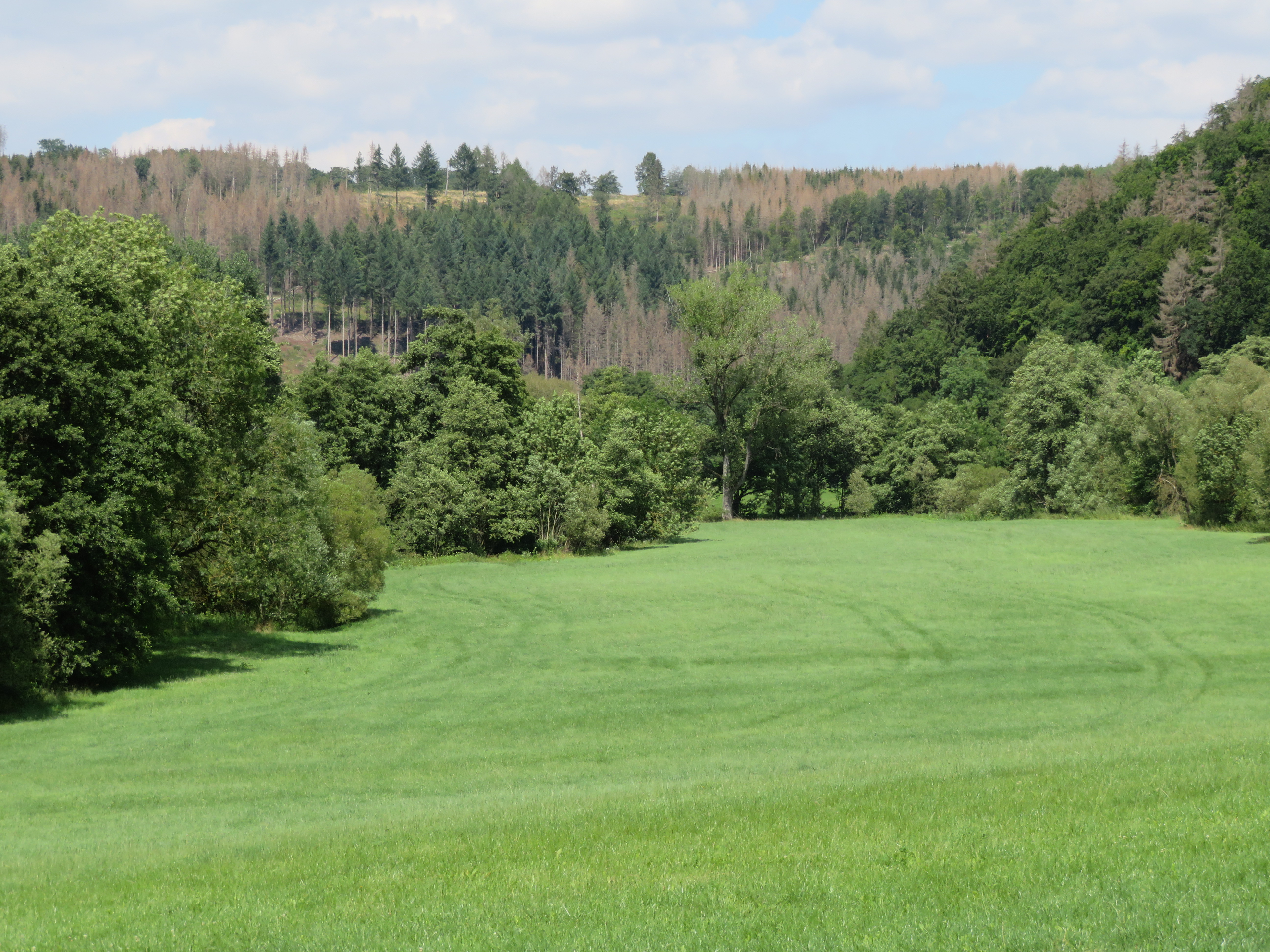 Talgrund gehört zum Naturschutzgebiet Oberes Diemeltal; Wald im Hintergrund zum LSG​